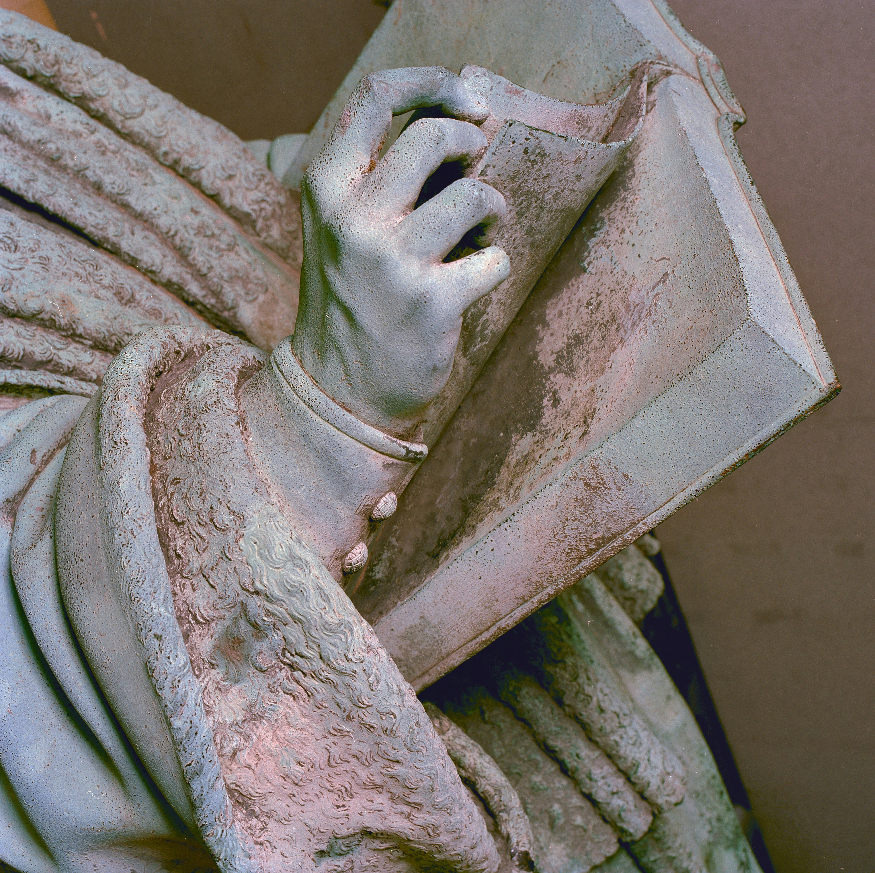 STANDBEELD VAN ERASMUS: INT. STANDBEELD, DETAIL HAND (TIJDENS OPSLAG IN AMSTERDAM)